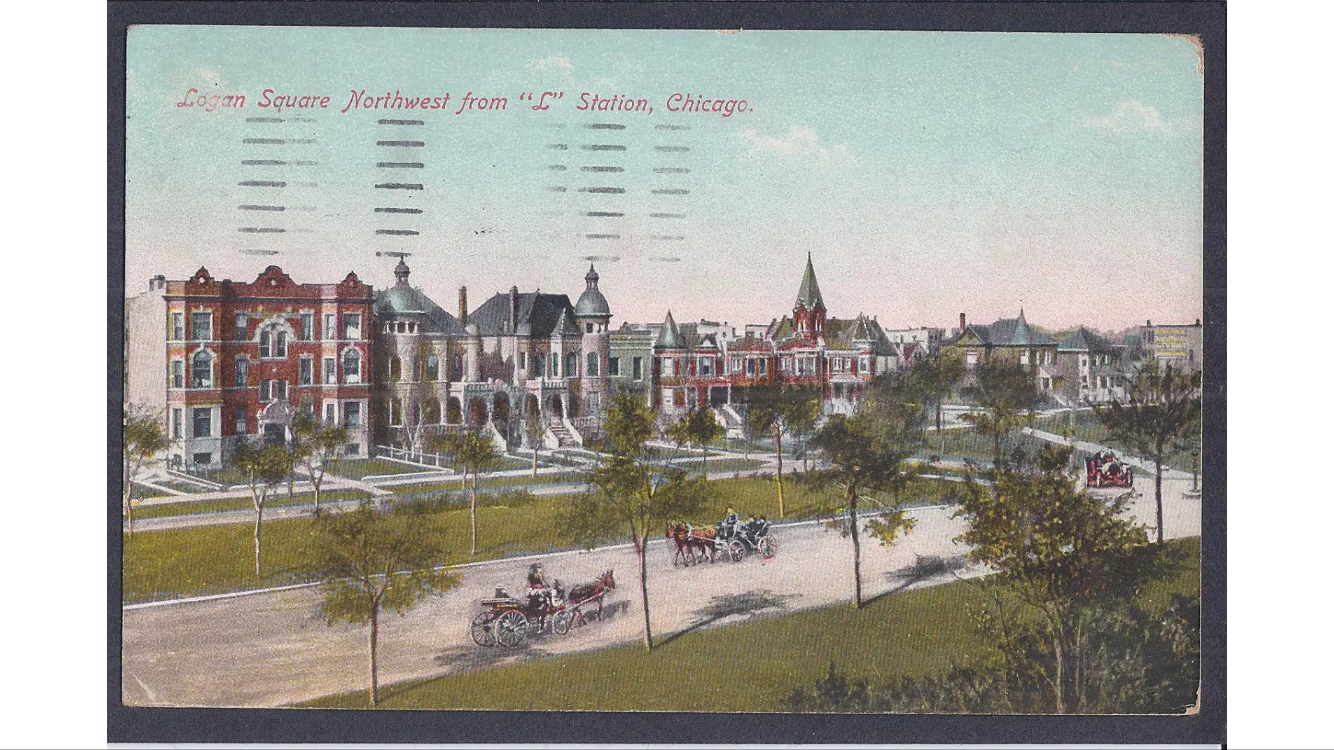 Logan Square, Chicago circa 1909 (front)